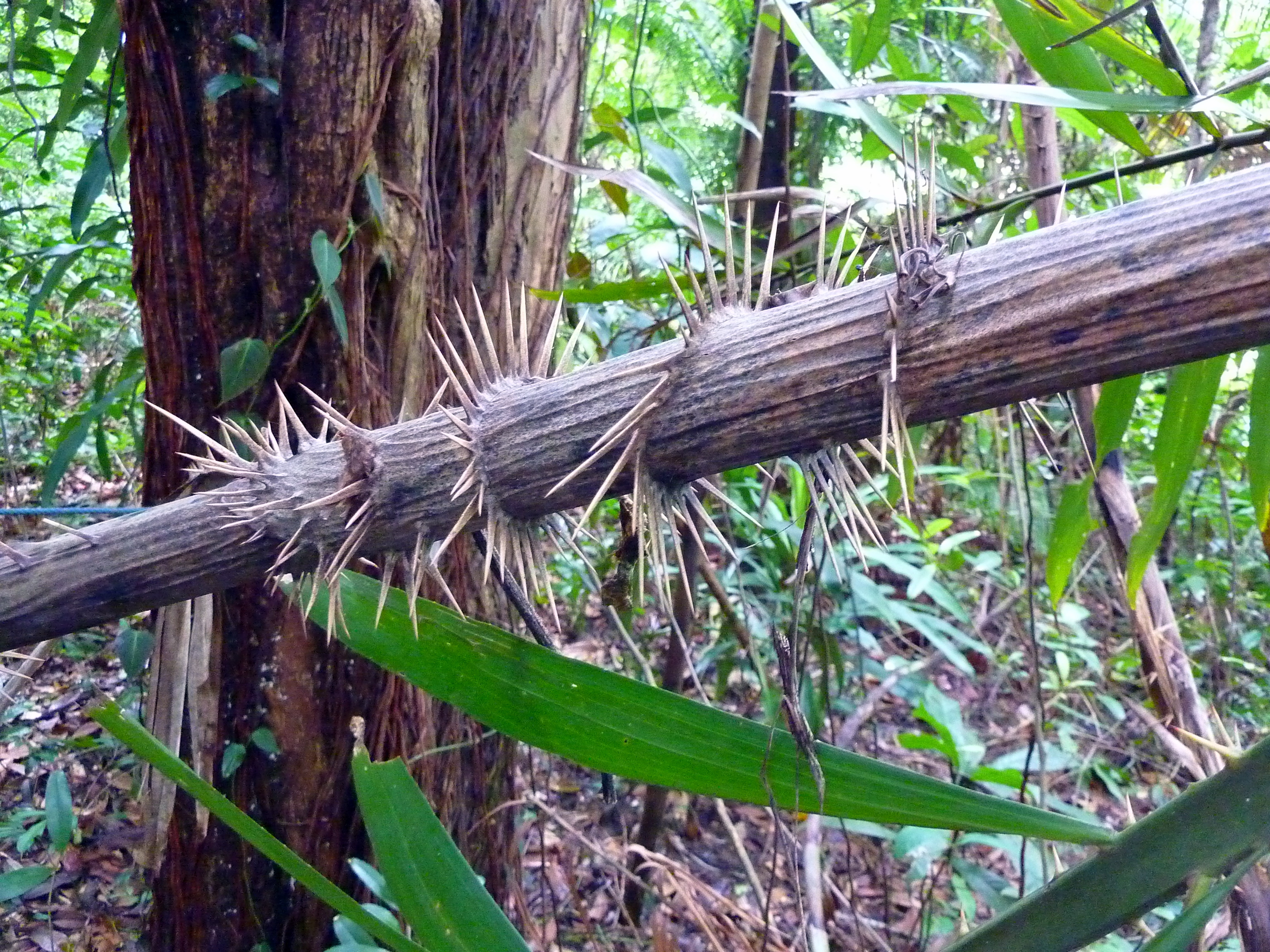 Myrialepis paradoxa, photo prise à Singapour au jardin botanique